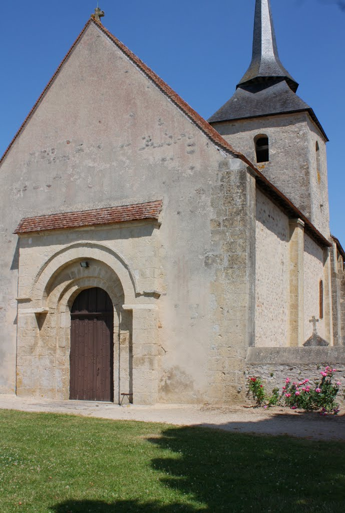 Saint-Georges-de-Poisieux - Eglise Saint-Georges